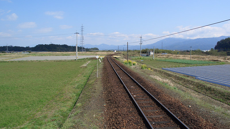 くま川鉄道湯前線ja:川村駅 駅周辺 湯前駅寄りのホーム端から駅東側を見る。 右側の堤の向こうがja:球磨川、奥の線路がカーブした先がja:川辺川。 撮影者/著者/著作権保有者 : MK Products (本人がアップロード) 撮影日 : 2007/03/14 川村駅 (熊本県)用にアップロードした画像です。良い画像があれば別の画像に変えてください。